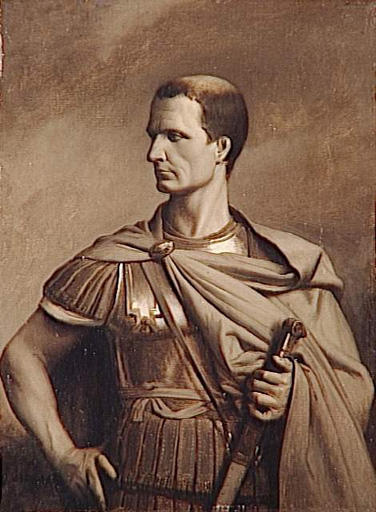 Jules César en buste